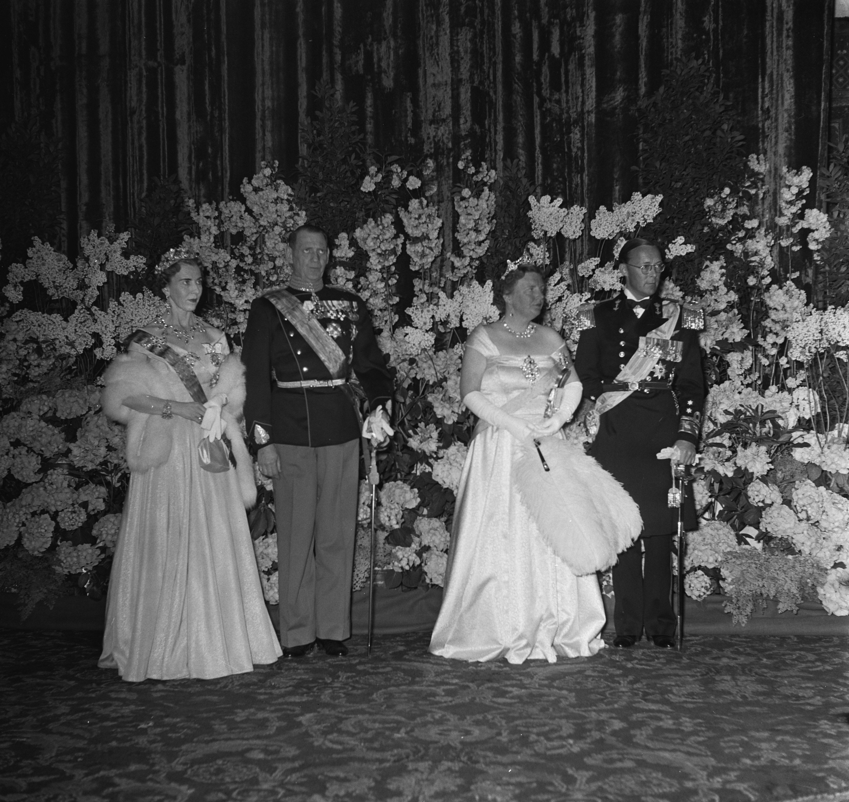 Collectie / Archief : Fotocollectie Anefo Reportage / Serie : [ onbekend ] Beschrijving : Receptie Ridderzaal Datum : 27 april 1954 Locatie : Den Haag, Zuid-Holland Trefwoorden : recepties Instellingsnaam : Ridderzaal Fotograaf : Noske, J.D. / Anefo Auteursrechthebbende : Nationaal Archief Materiaalsoort : Negatief (zwart/wit) Nummer archiefinventaris : bekijk toegang 2.24.01.03 Bestanddeelnummer : 906-4262